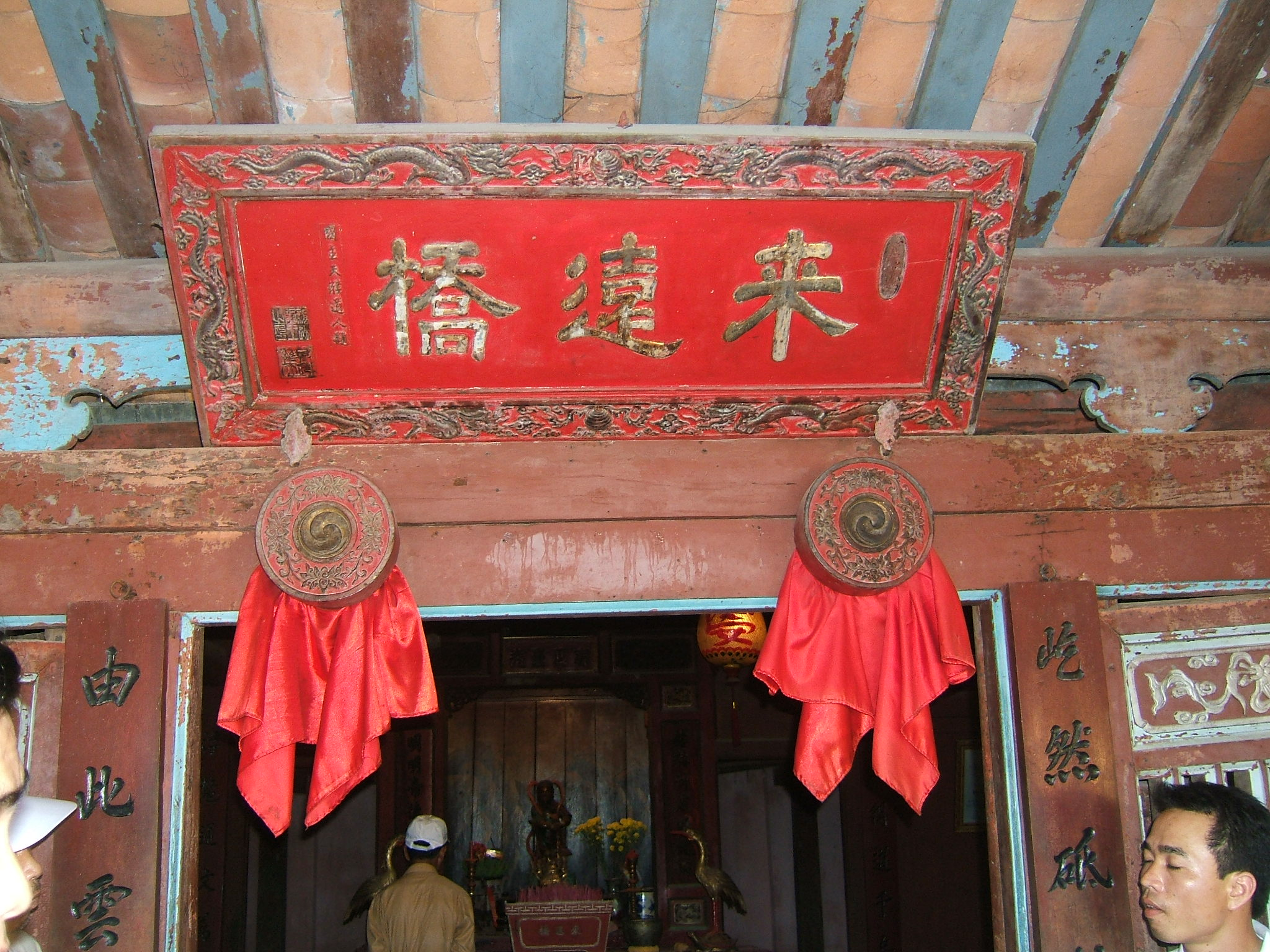 Pagoda inside the bridge